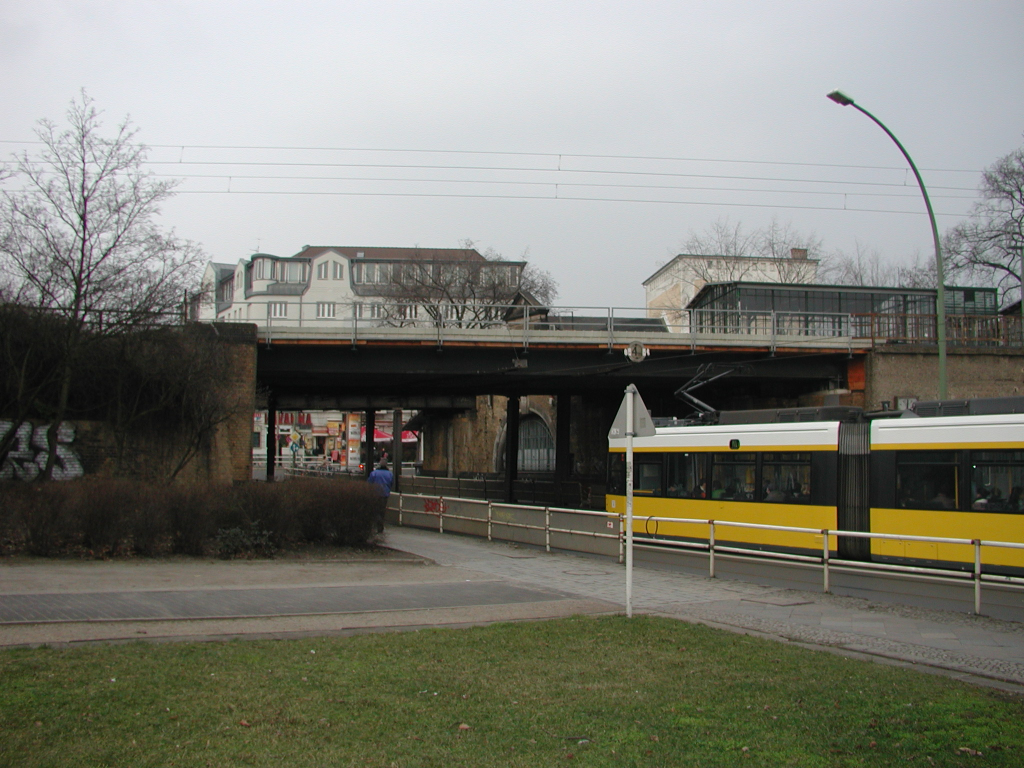 Brücke Bahnhof Karlshorst (2)